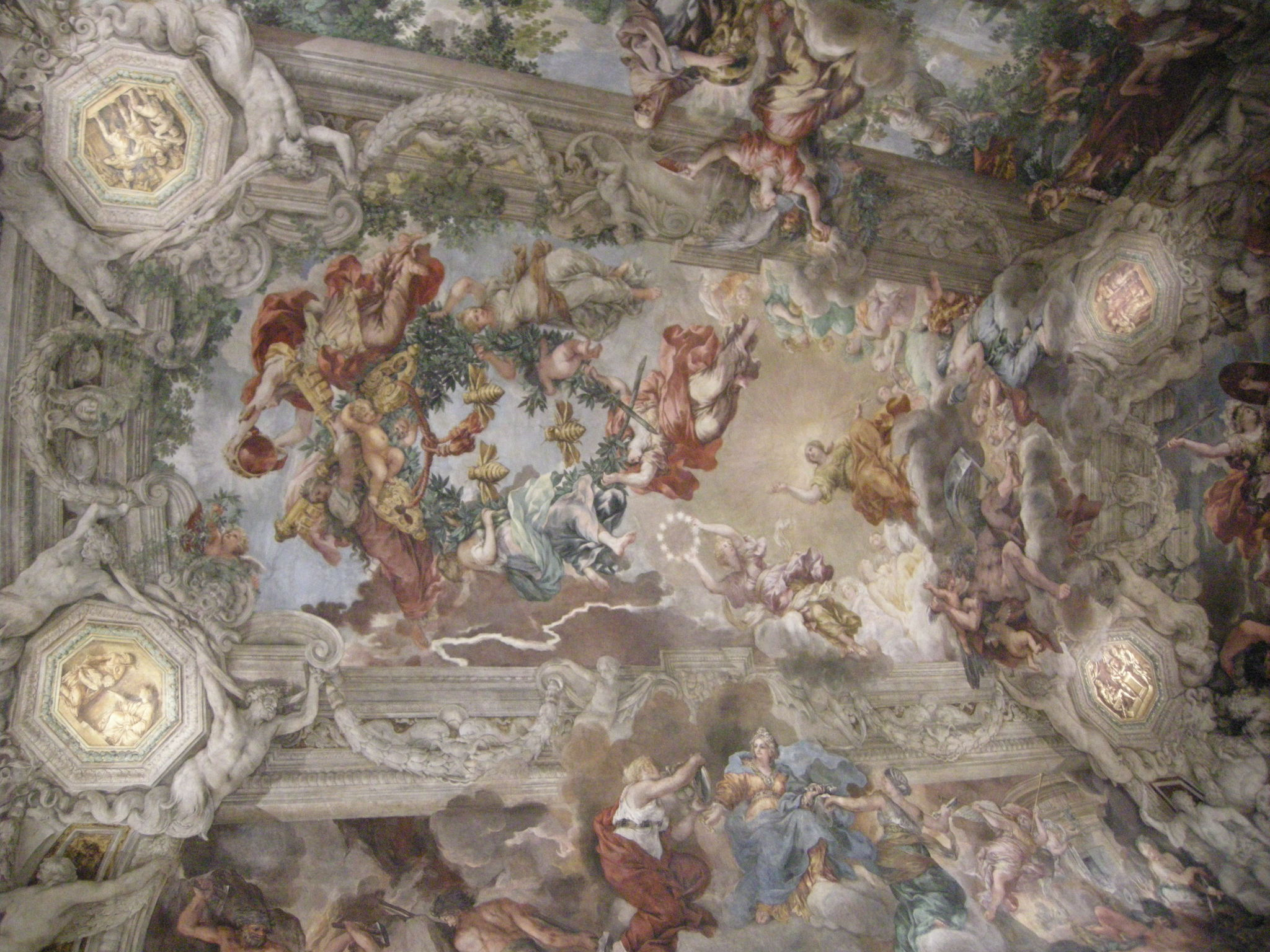 Palazzo Barberini (Rome), pietro da cortona ceiling